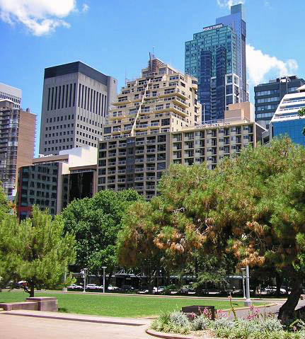 Hyde Park, Sydney